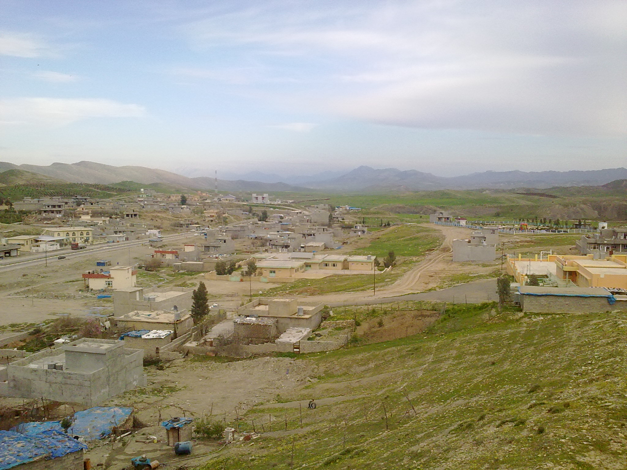 کوردی: ناحیەی سکتان لە خۆرئاویەوە وێنەکە گیراوە لەلایەن ڕەزوان سکتانی